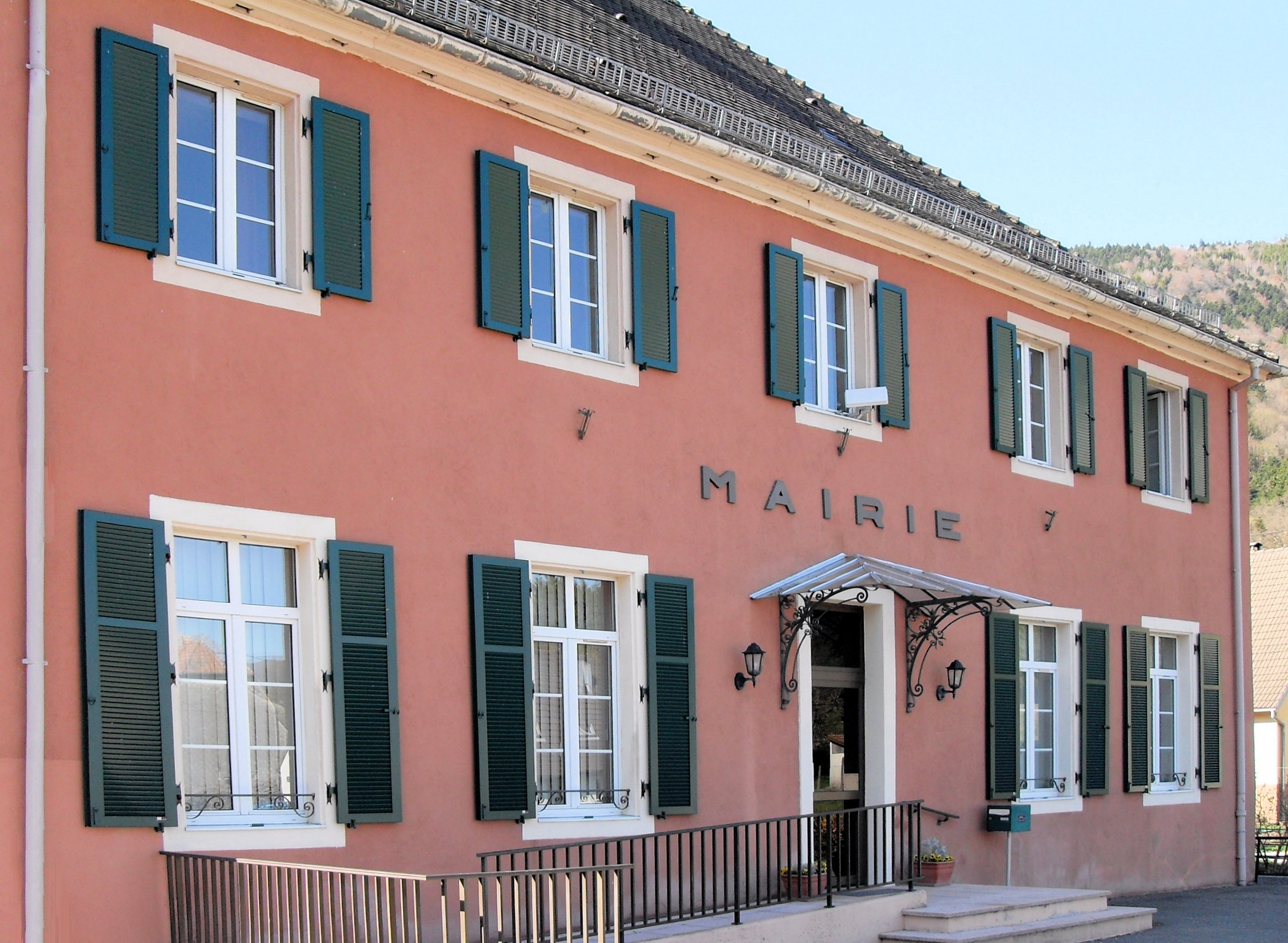 La mairie de Sewen